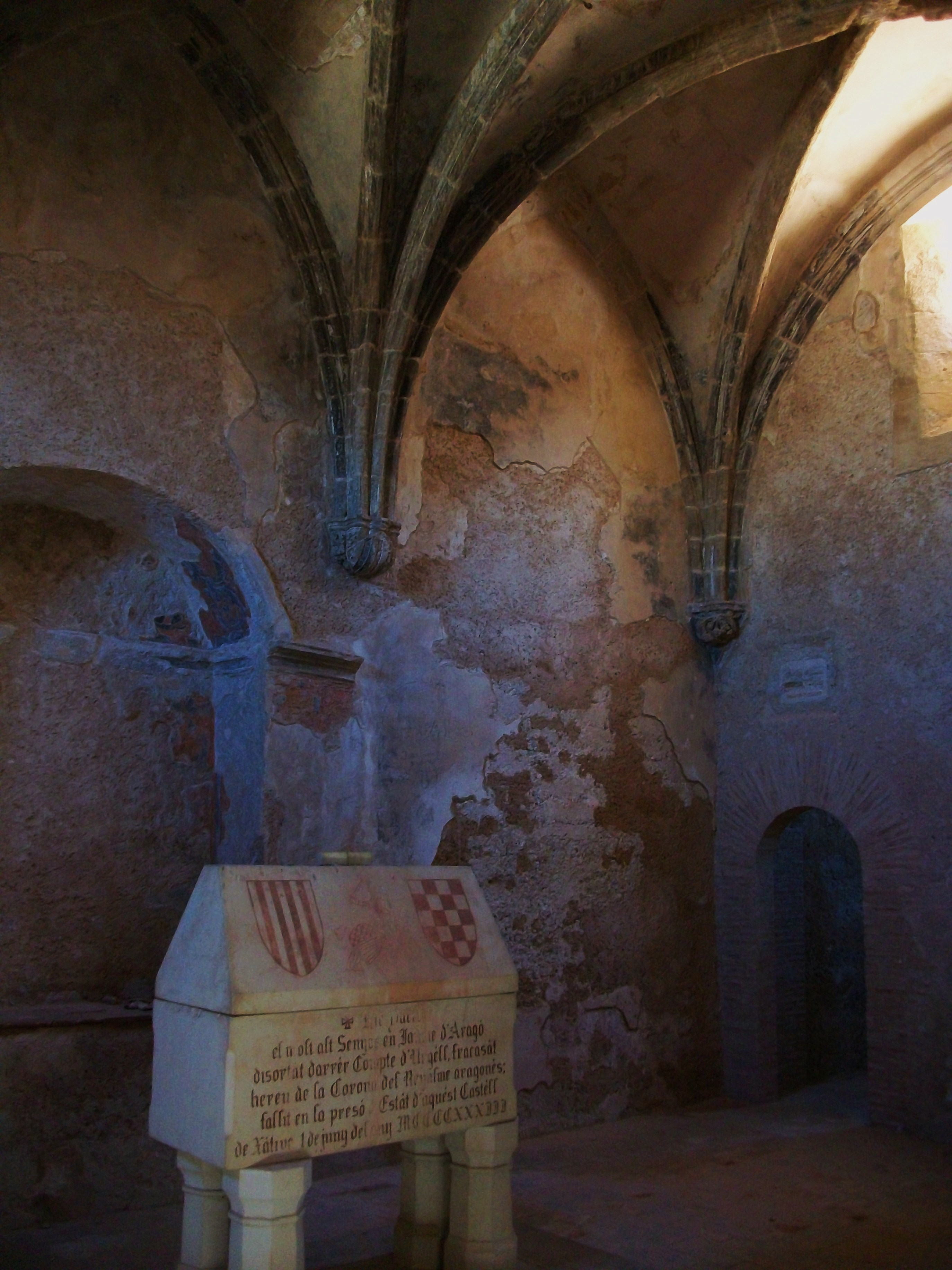 Interior de la capella de Santa Maria del Castell de Xàtiva, la Costera, País Valencià.